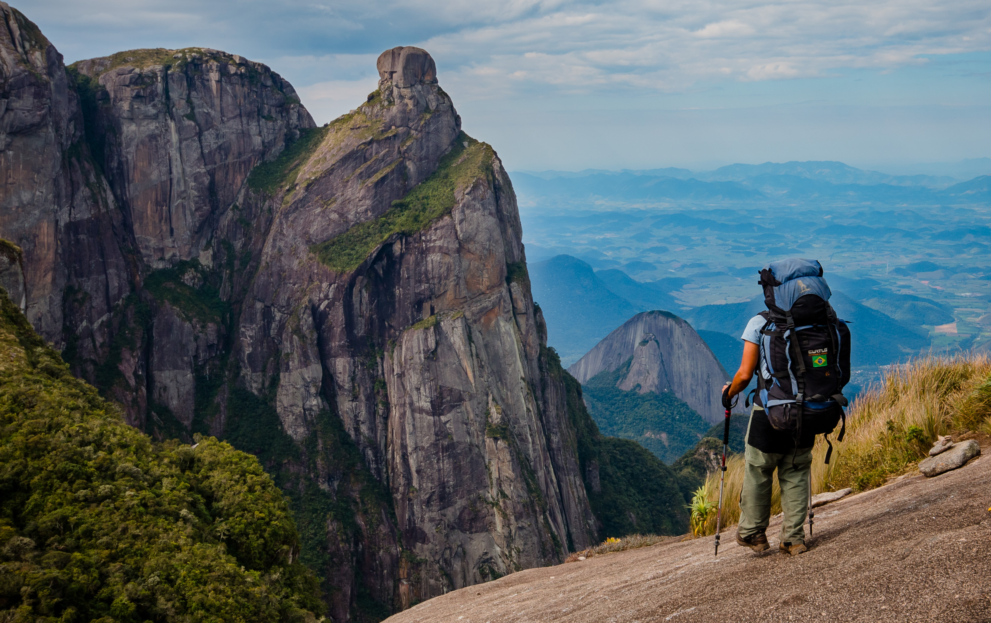 Travessia.